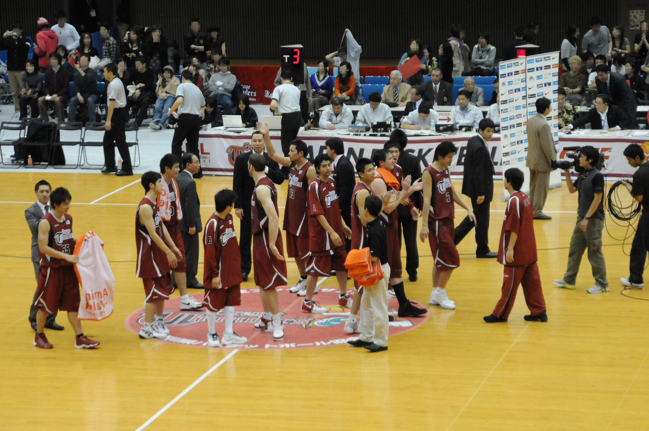 東芝ブレイブサンダース、とどろきアリーナで。